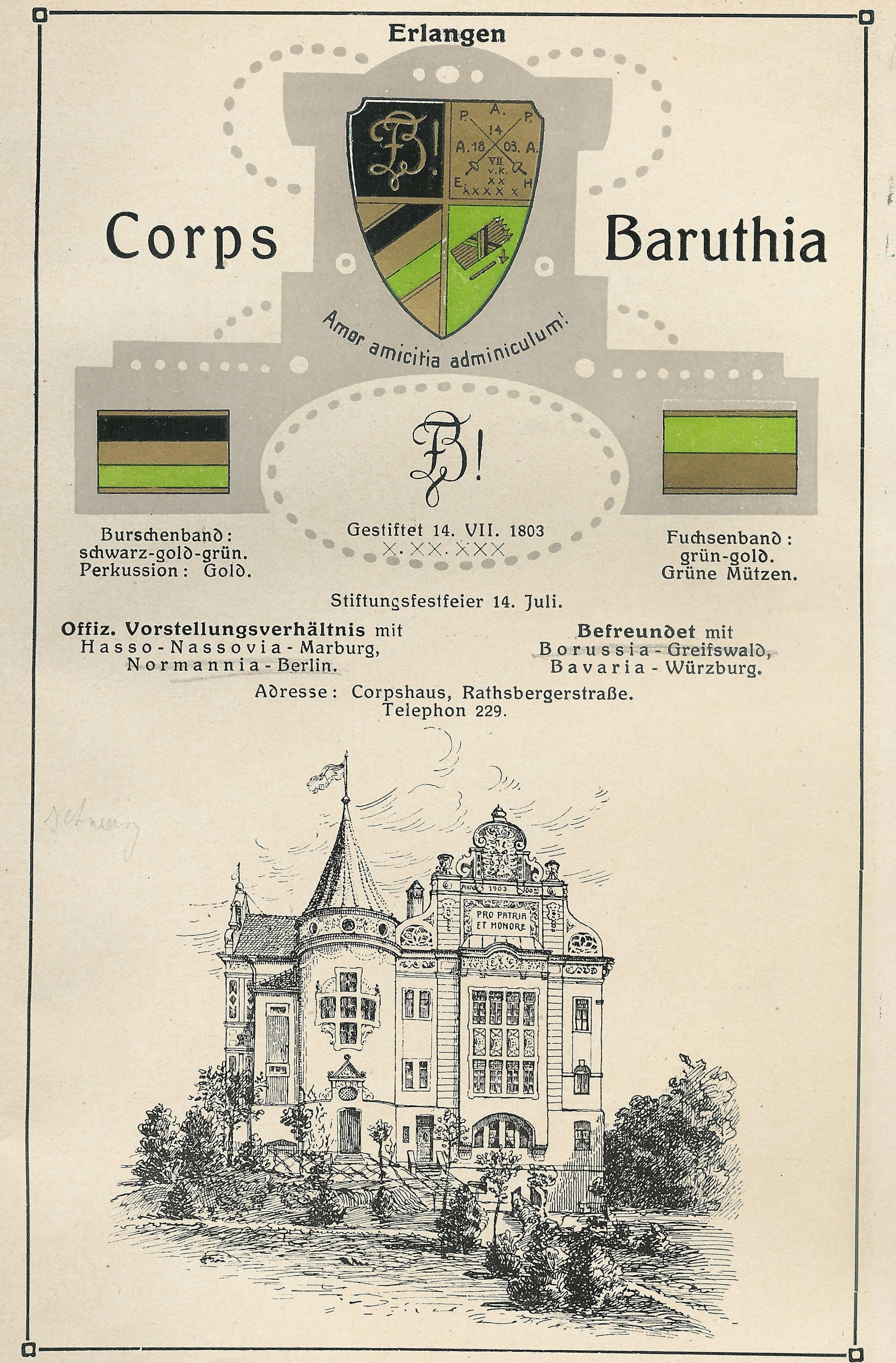 Couleur, Wappen, Zirkel und Corpshaus der Baruthia Erlangen